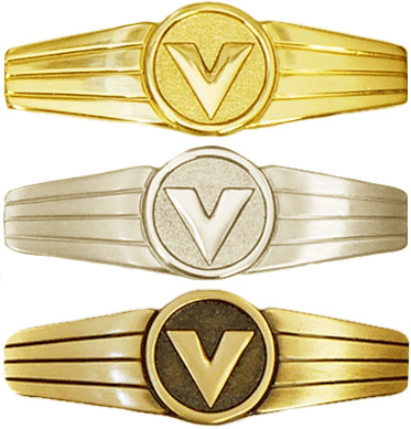 Orden und Ehrenzeichen (Bundeswehr) Tätigkeitsabzeichen Versorgung-Nachschubpersonal in gold, silber und bronze